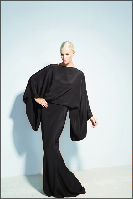 Thang de Hoo für Daniel Benjamin Geneva Kollektion 20112